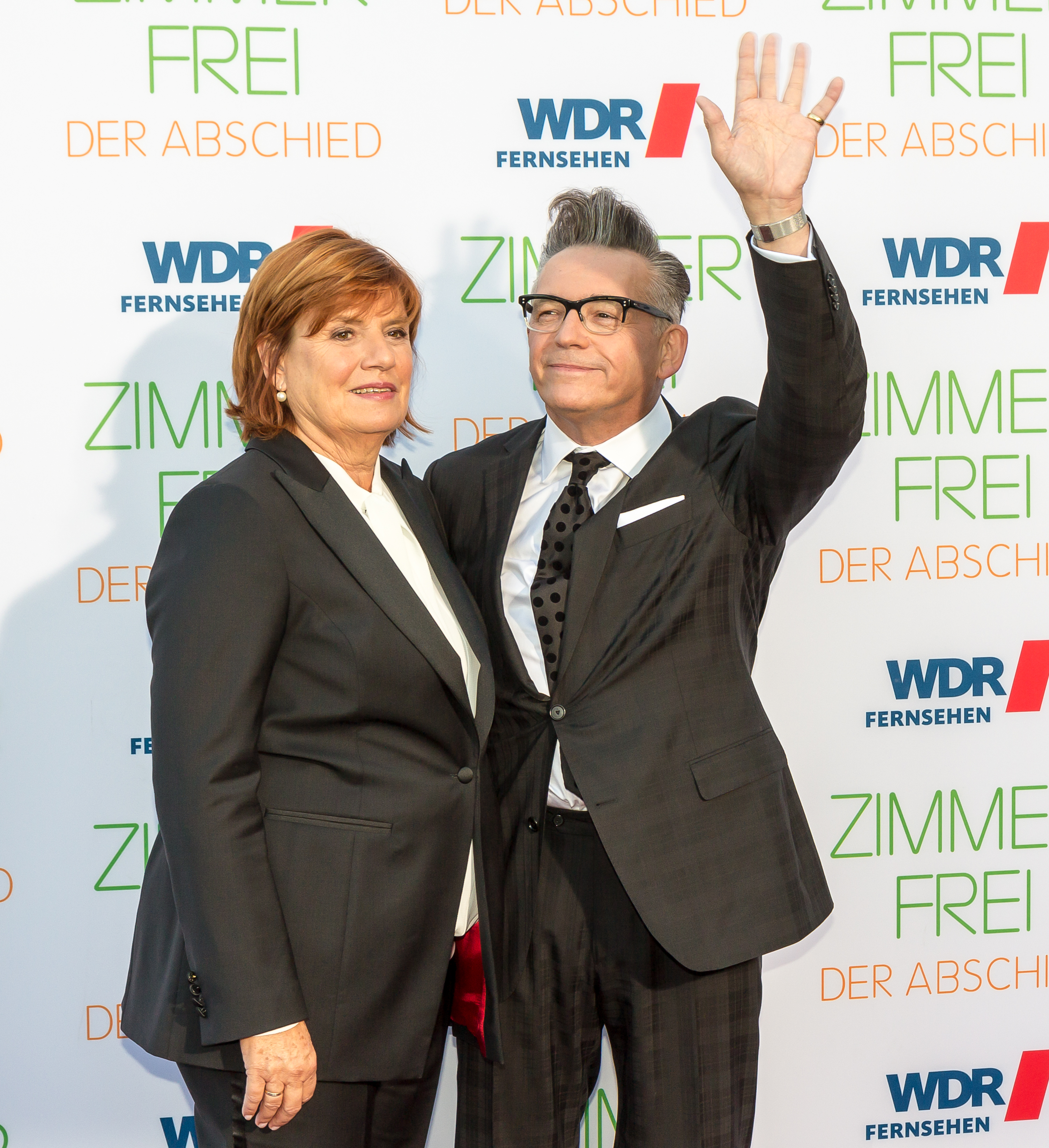 Zimmer frei - der Abschied Foto: Die Zimmer frei-Moderatoren Christine Westermann und Götz Alsmann